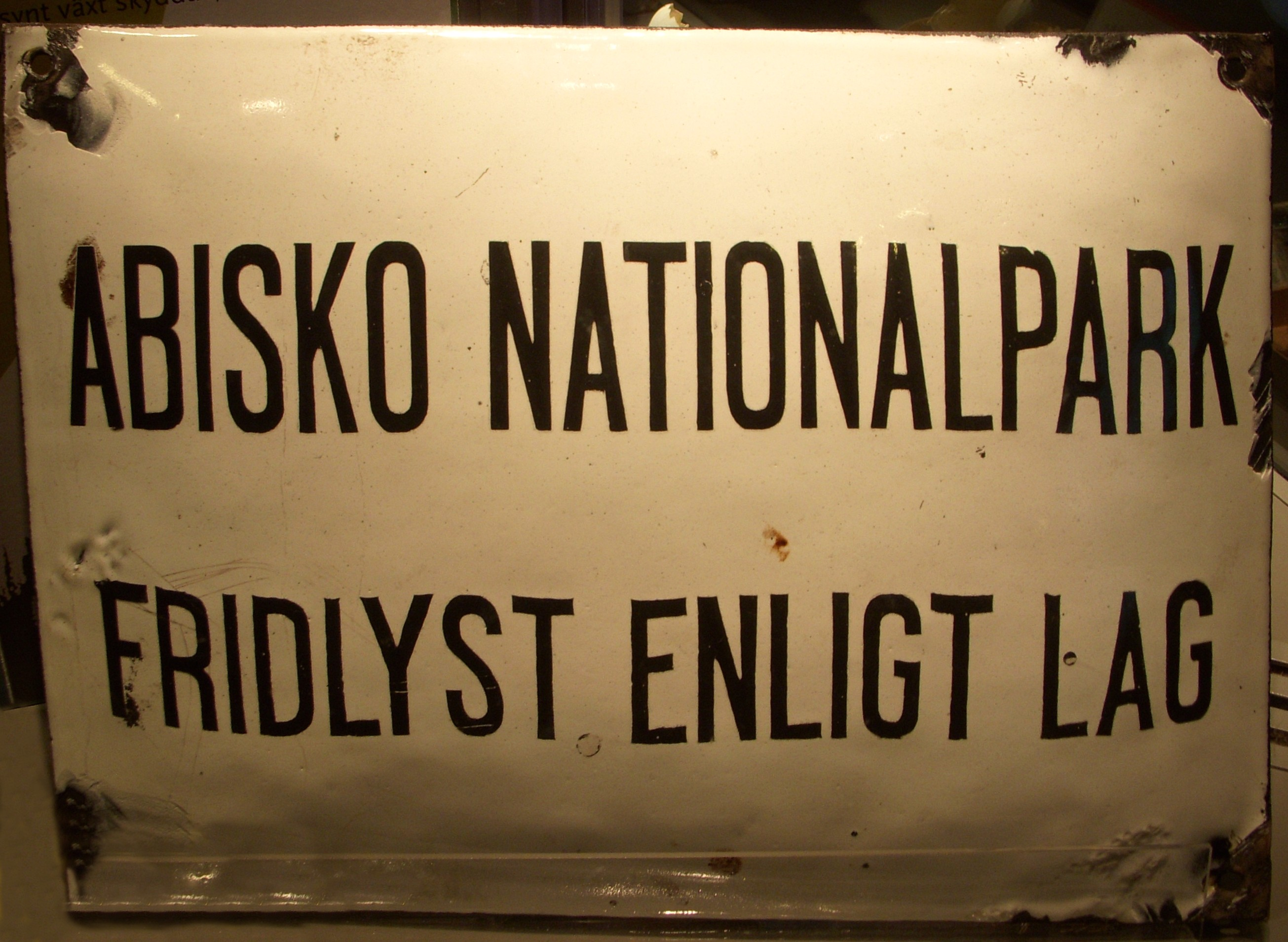 Abiskos äldre skylt på Naturhistoriska Riksmuseet i Stockholm